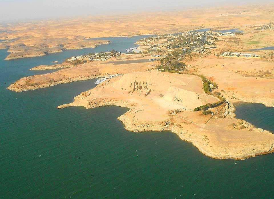 قديم تقع معبد ابوسمبل جنوب السد العالى وقدبناه رمسيس الثانى اكراما لزوجته نفرتارى النوبية